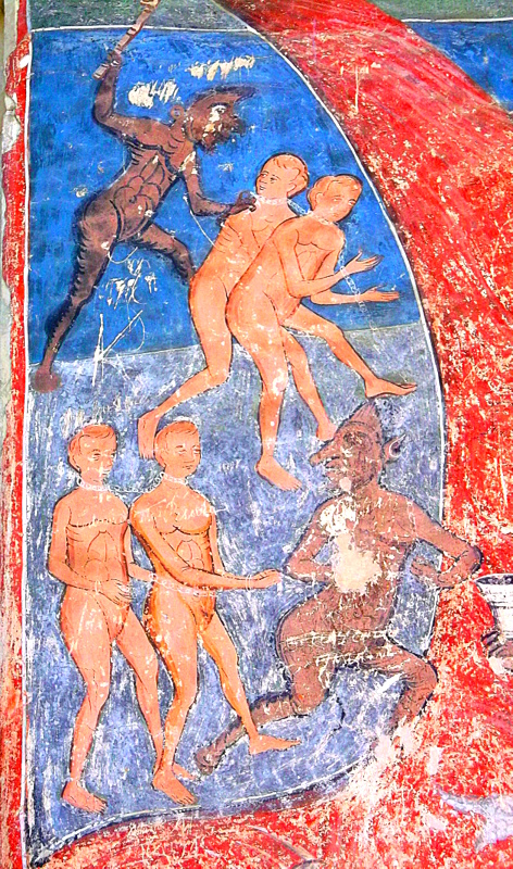 Watra Mołdowica (Vatra Moldoviţei), cerkiew, fragment fresku